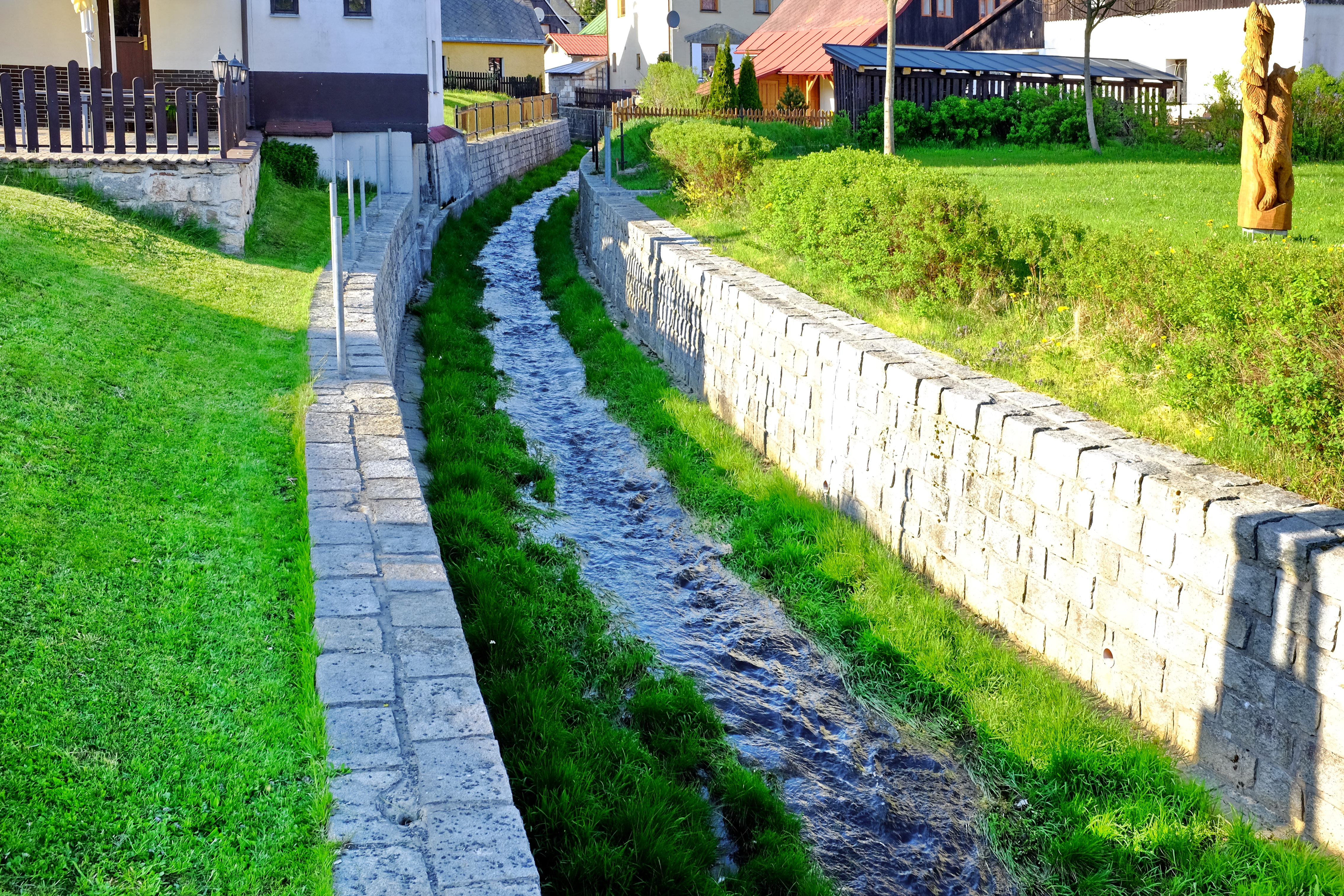 Potok Bílá Bystřice v Perninku, přítok Bystřice v Krušných horách, okres Karlovy Vary